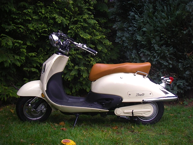 Zinelli elektrische retro-scooter zonder rugsteun en bagagerek, kleur Bianco